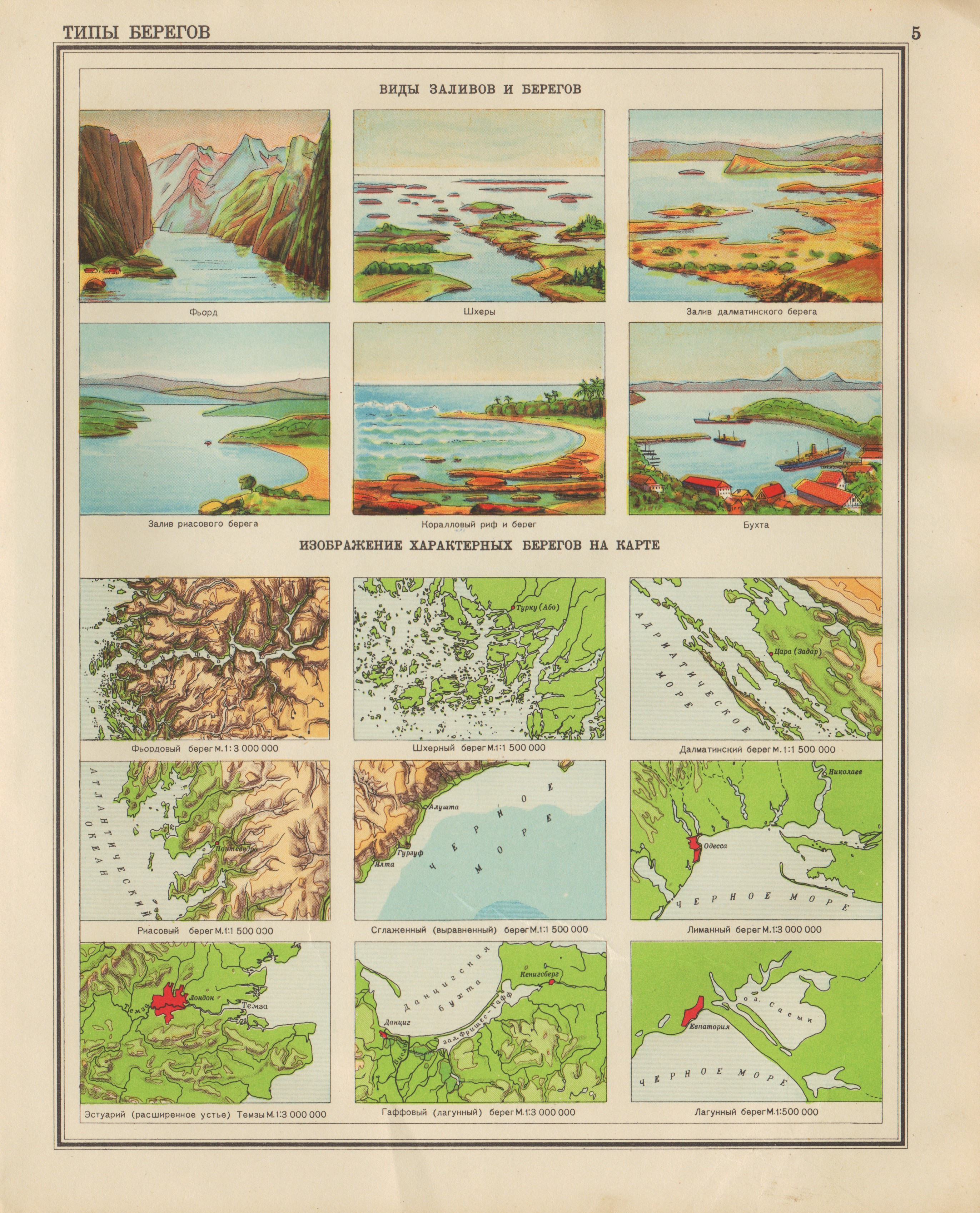 Географический атлас для 5-го и 6-го классов средней школы